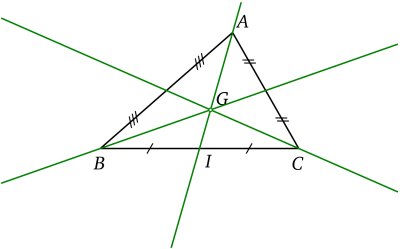 Médianes et isobarycentre d'un triangle. Licensing Catégorie:Schémas de mathématiques